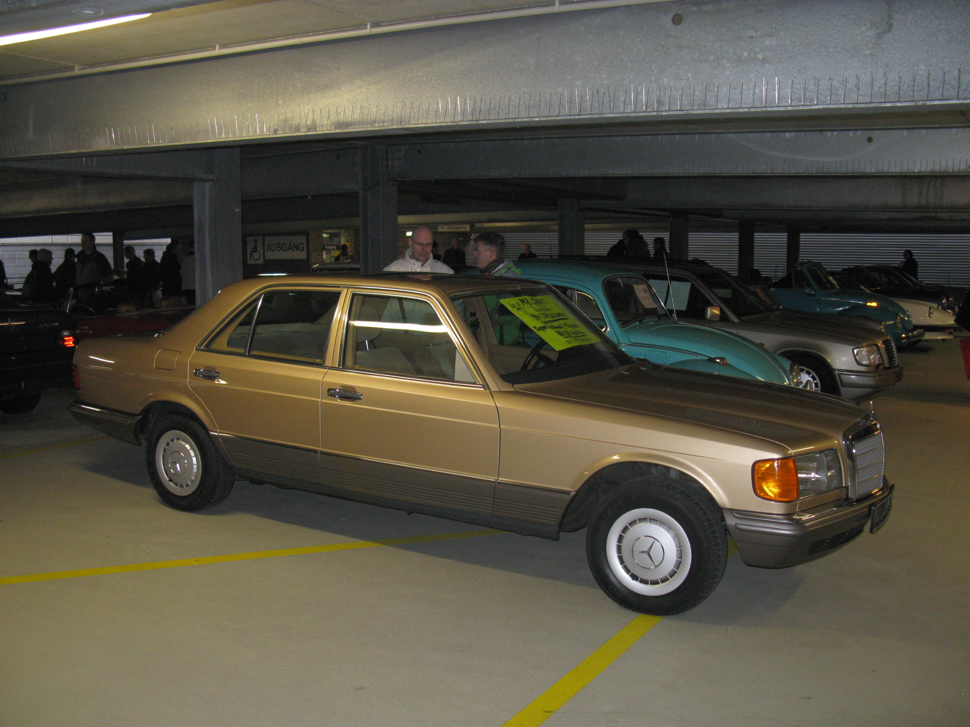 Mercedes-Benz 280 S